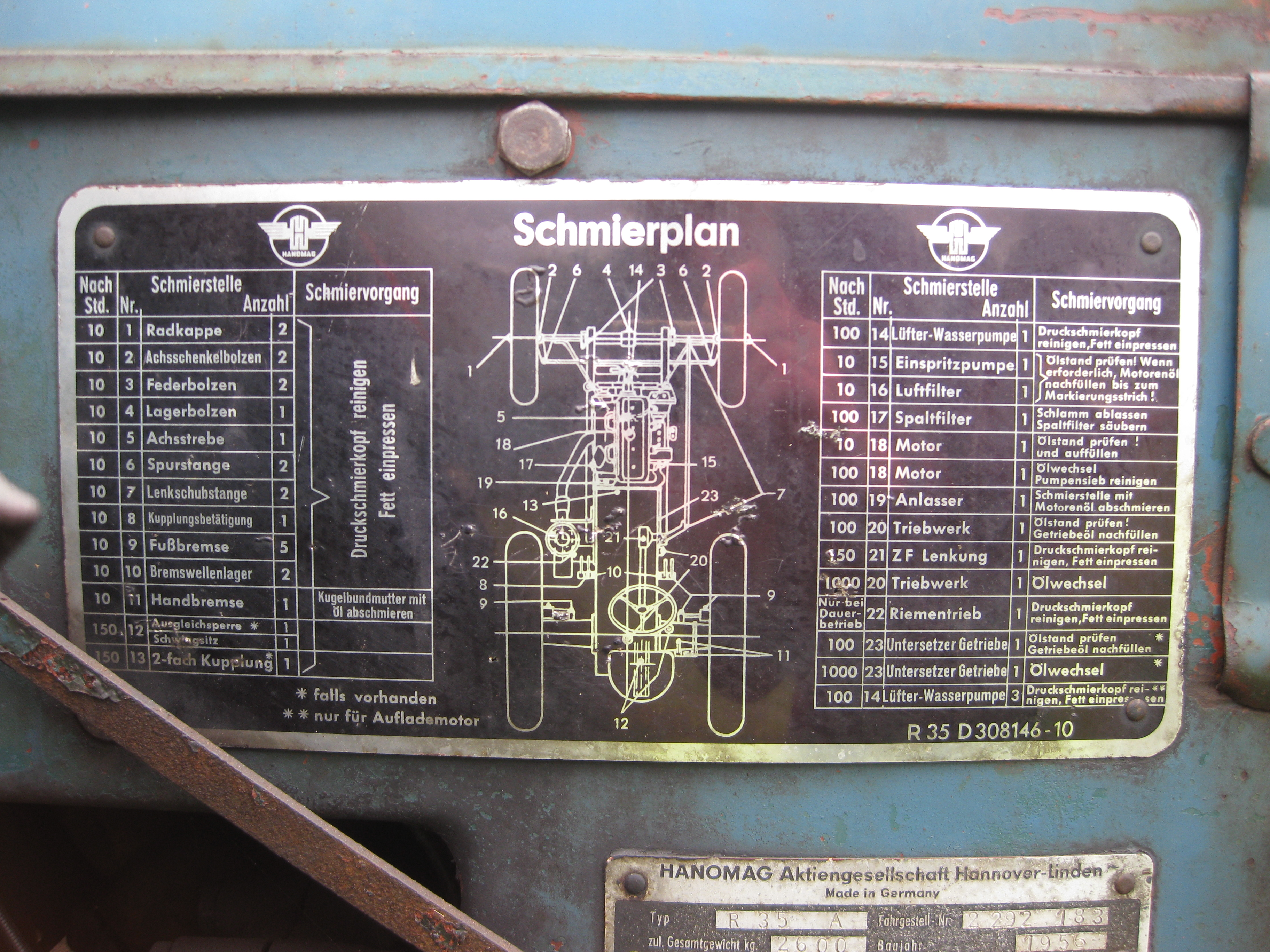 Hanomag Traktor Schmierplan